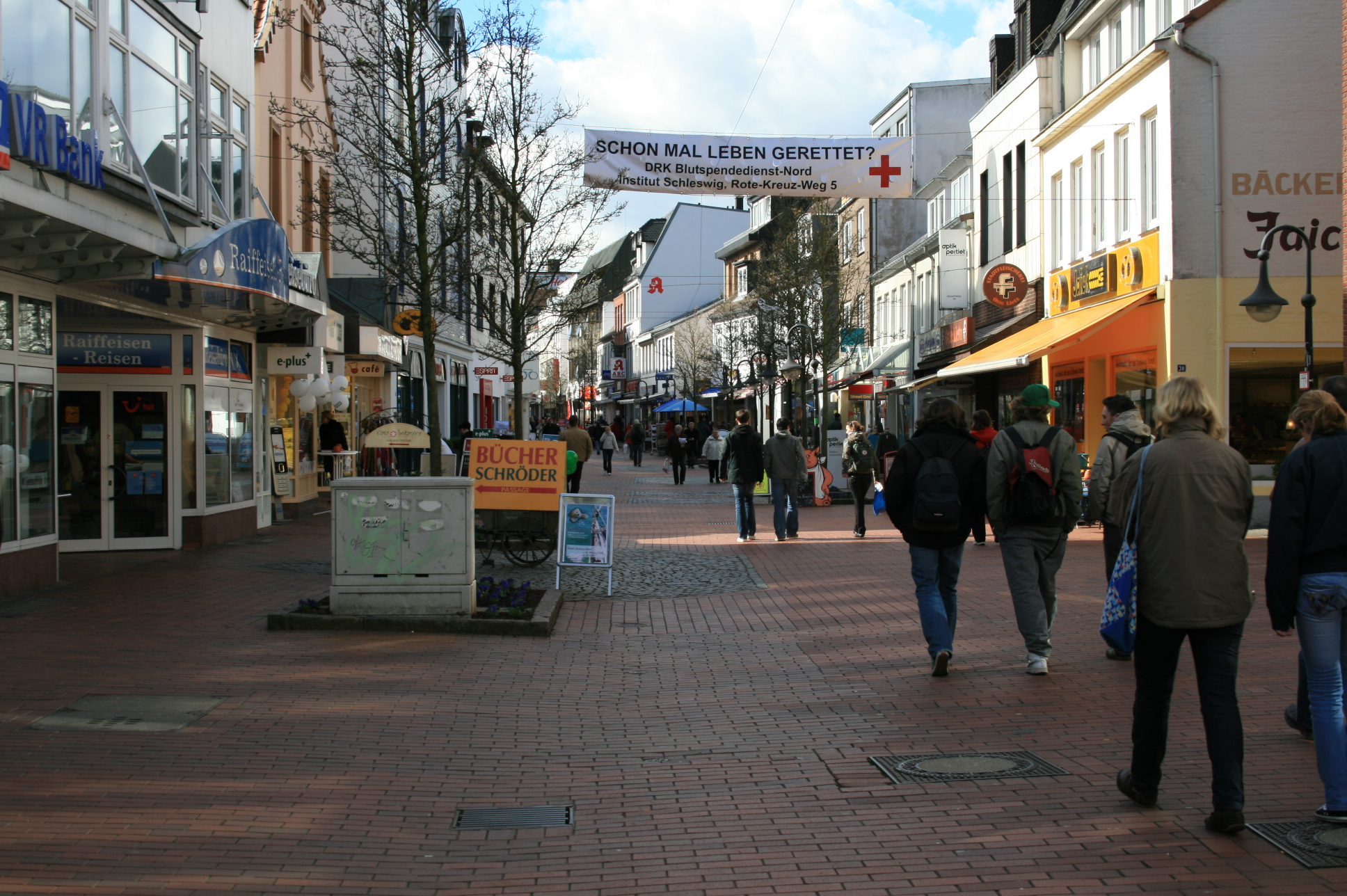 Ladenstrasse Schleswig